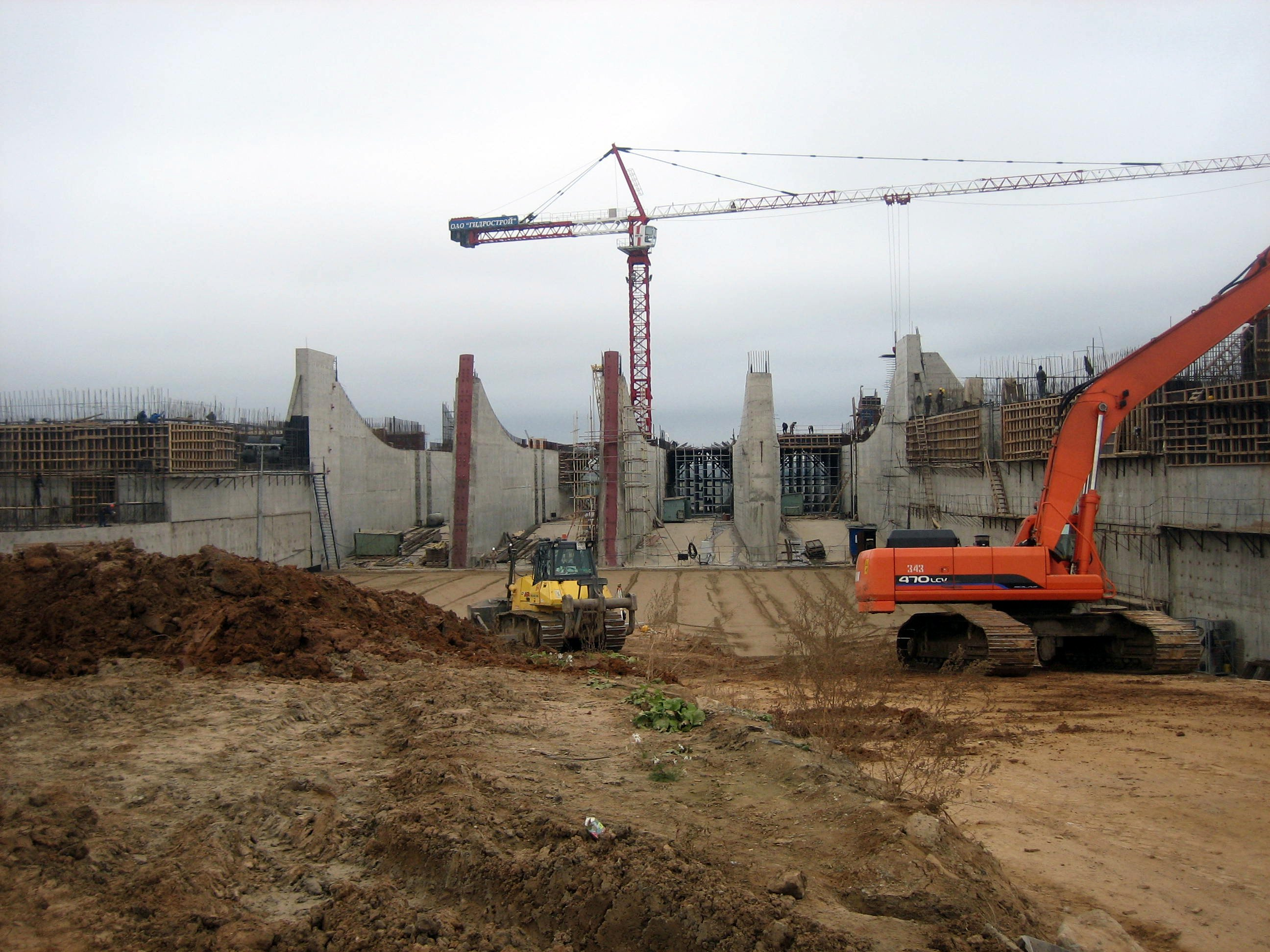 Строительство водоприемника Загорской ГАЭС-2